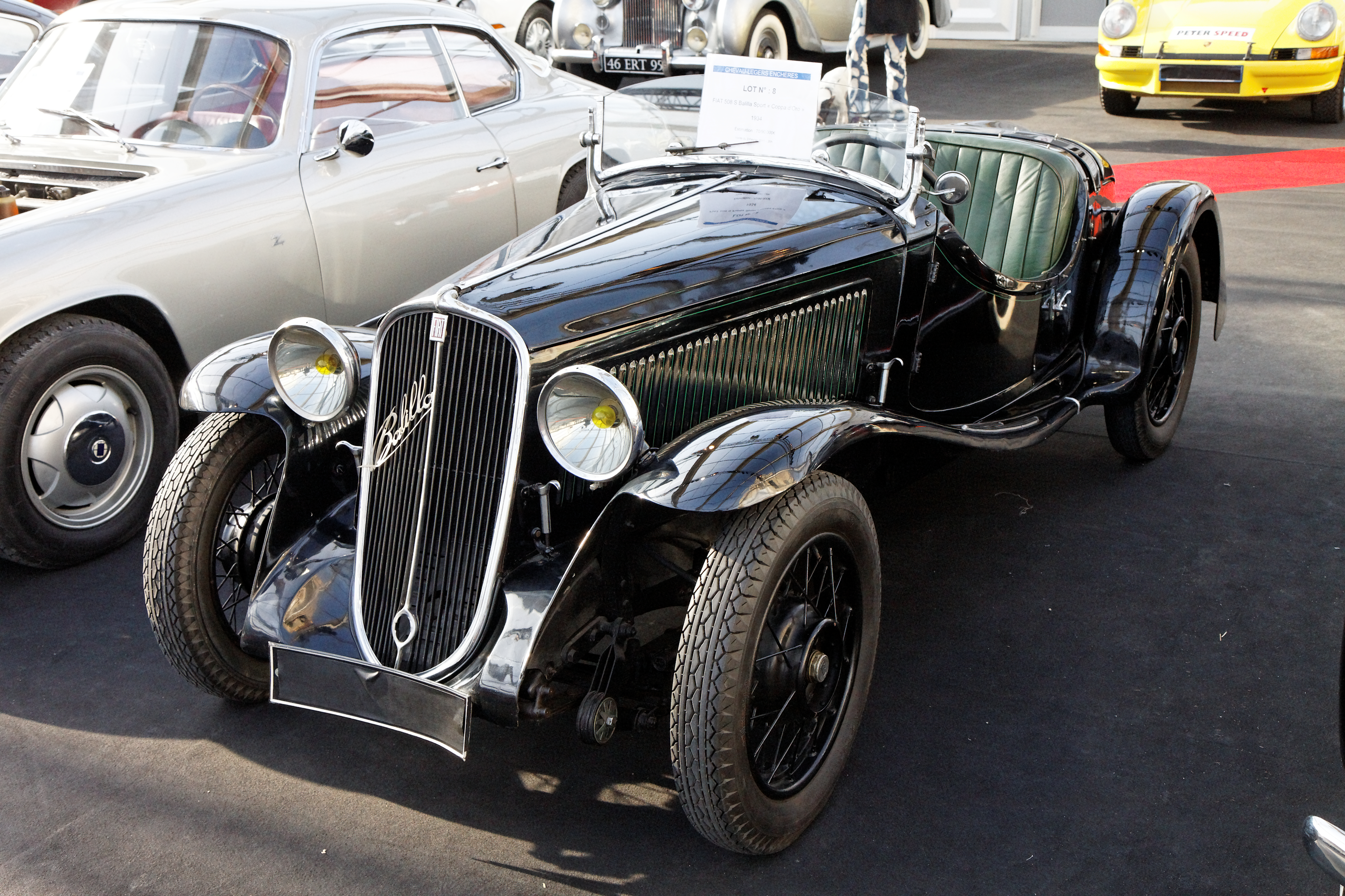 Fiat 508 S Balilla Sport - Festival Automobile International 2011 - Vente aux enchères